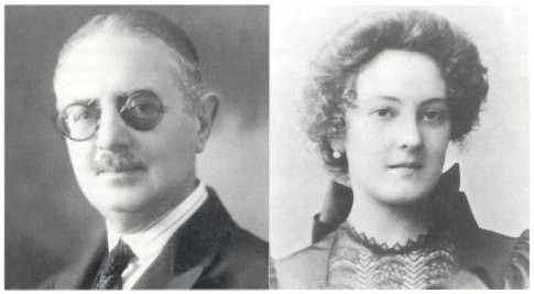 Chilean President Salvador Allende's parents: Salvador Allende Castro & Laura Gossens Uribe